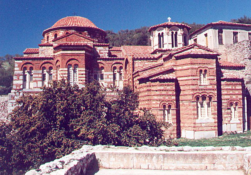 eigen foto